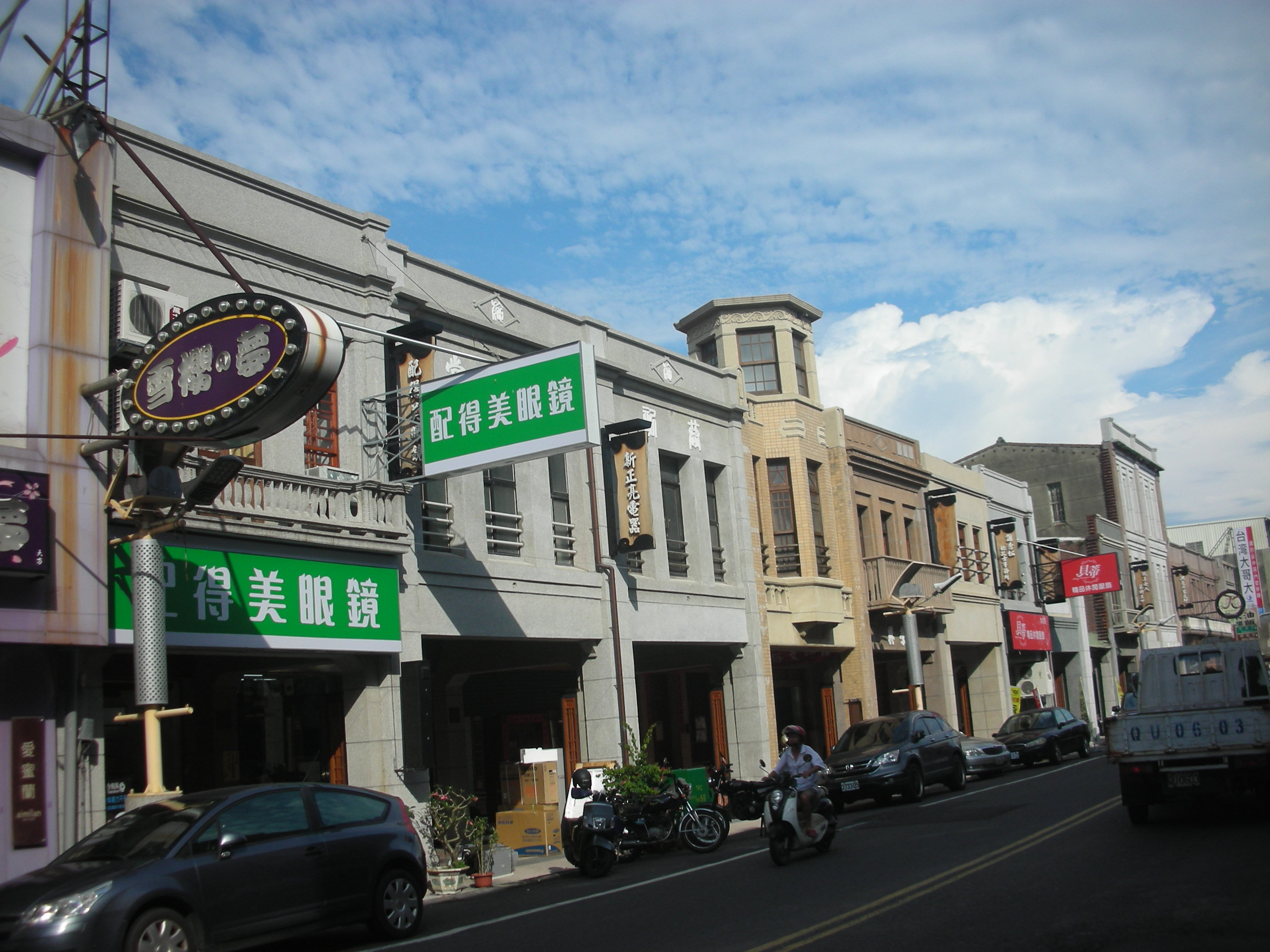 鹿港中山路街景 Lukang